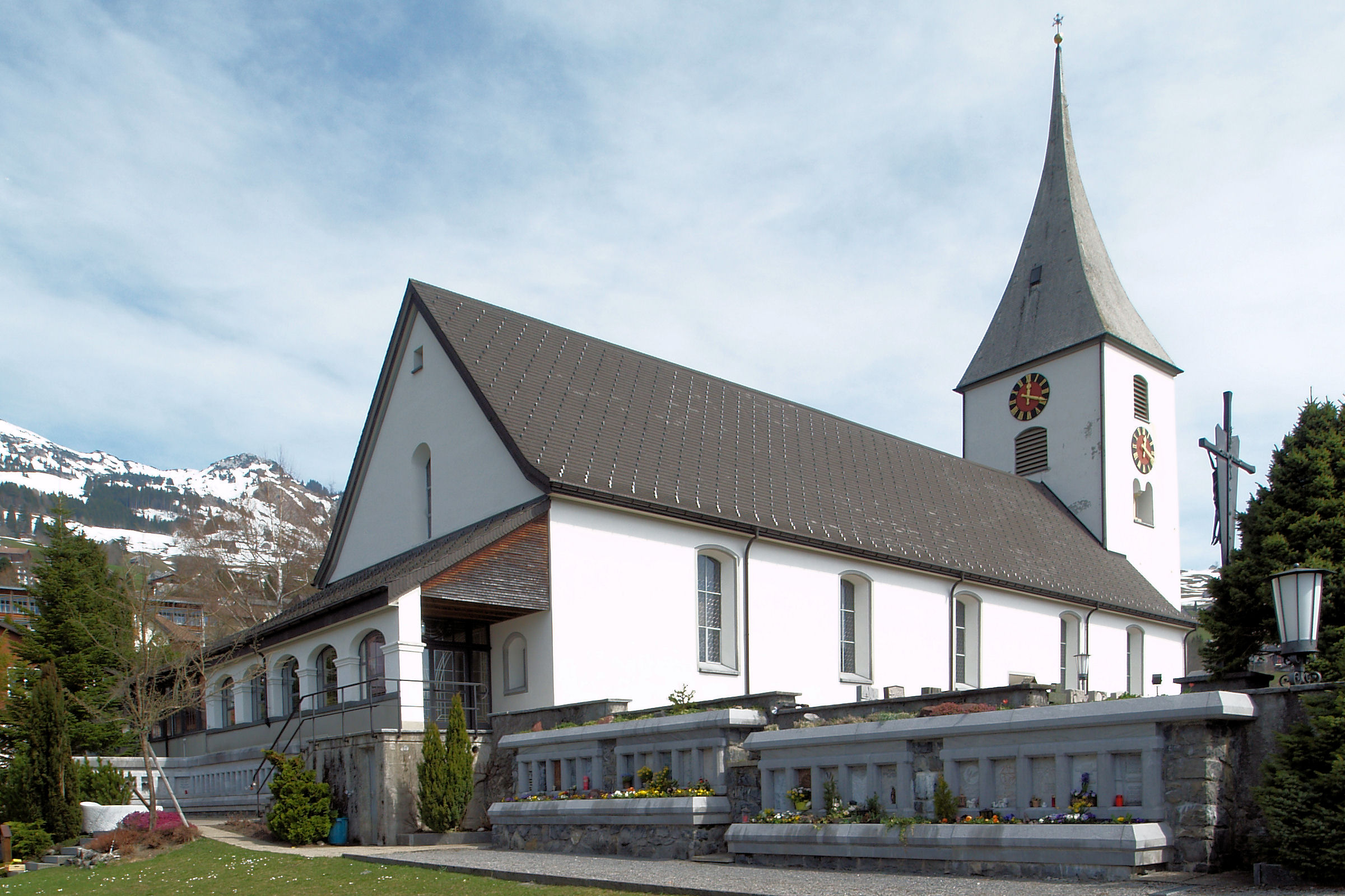 Die Pfarrkirche St. Gallus Amden. Ansicht von Südwesten.